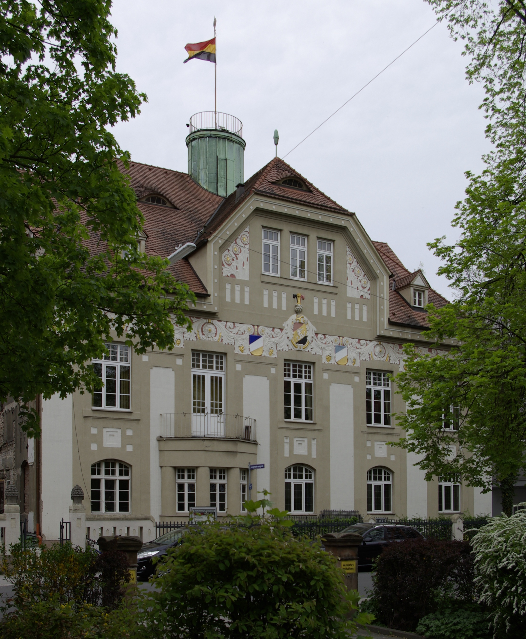 Germanenhaus der Burschenschaft Germania Erlangen in der dortigen Universitätsstraße